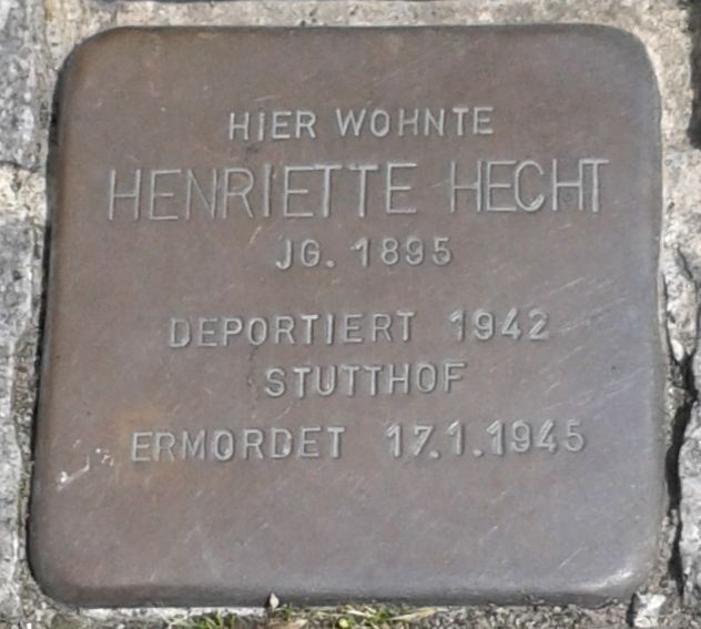 Stolperstein Datteln Tigg 9 Henriette Hecht